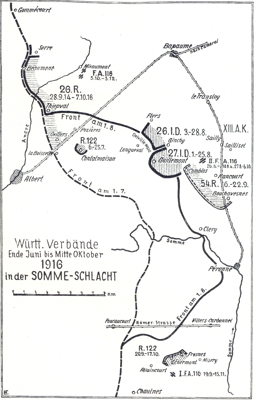 Karte Seite 56: Württ. Verbände Ende Juni bis Mitte Oktober 1916 in der SOMME-Schlacht